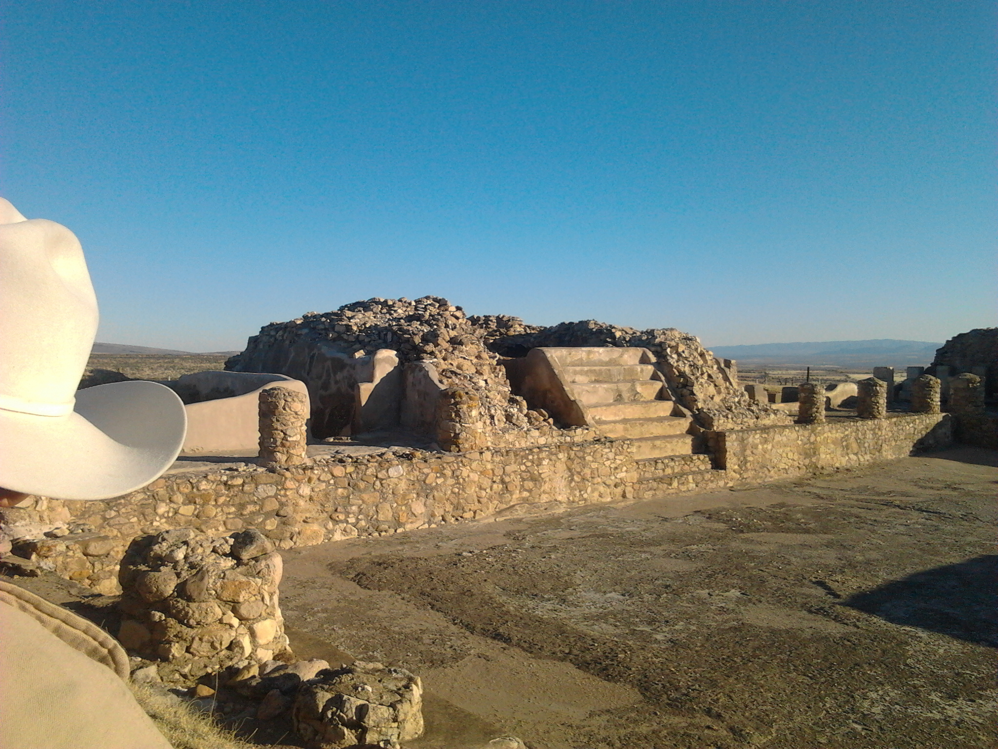 Altavista